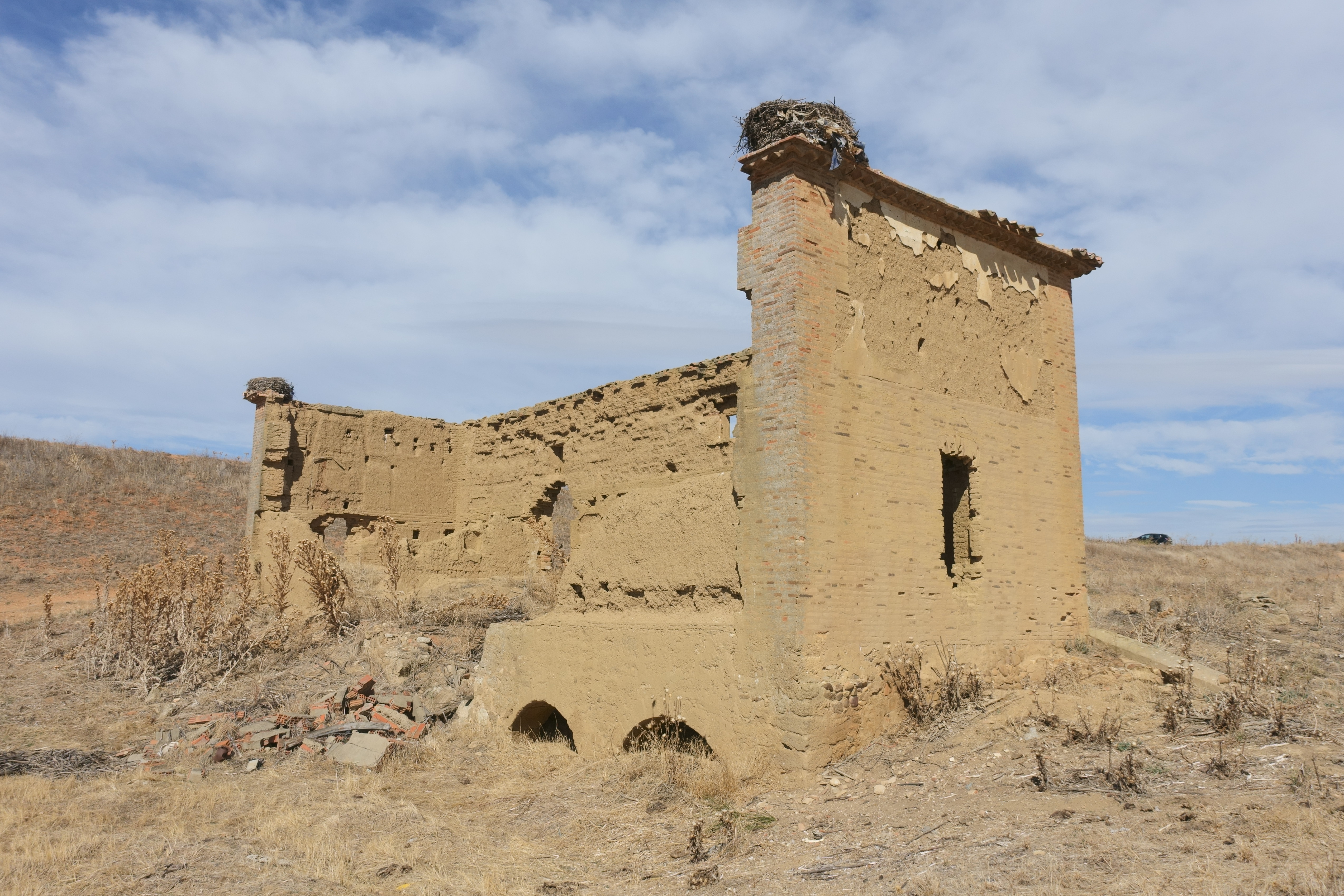 Ruinas del molino de Bragadilla, en Cañizo (Zamora, España).